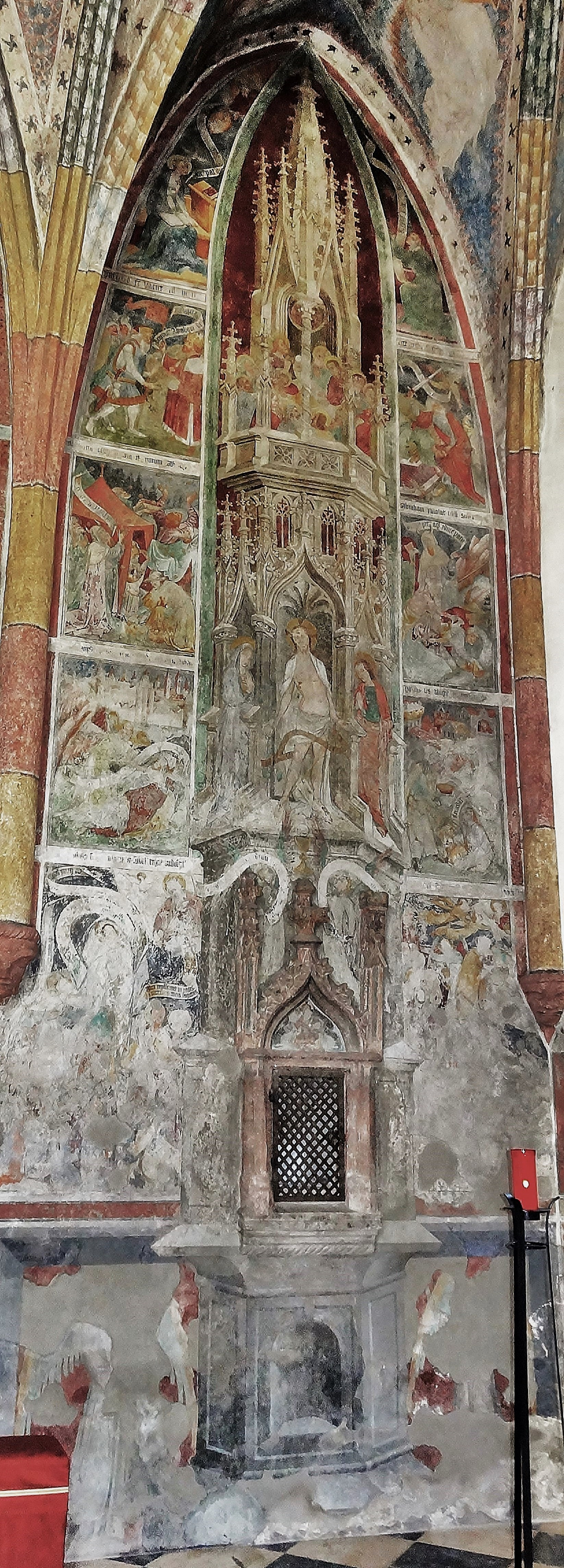 Kath. Pfarrkirche Hl. Andreas Thörl-Maglern, gemaltes Sakramentshaus um die Sakramentsnische